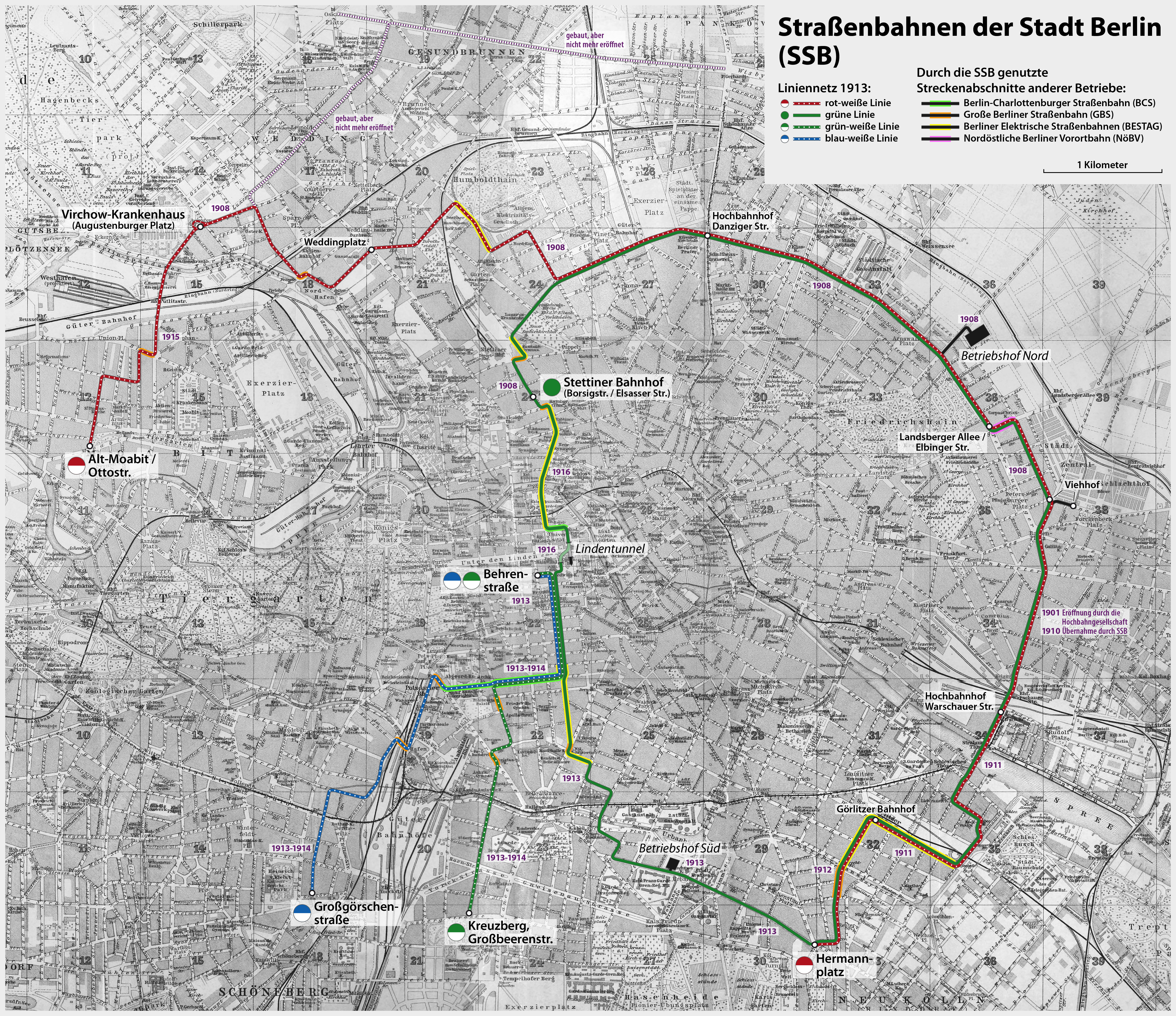 Karte der Straßenbahnen der Stadt Berlin